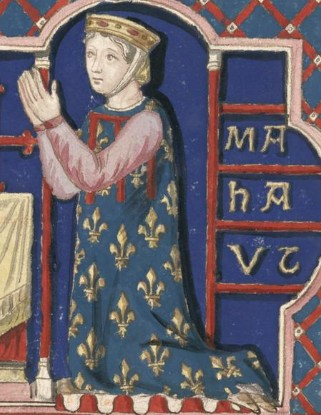 Mahaut de Boulogne